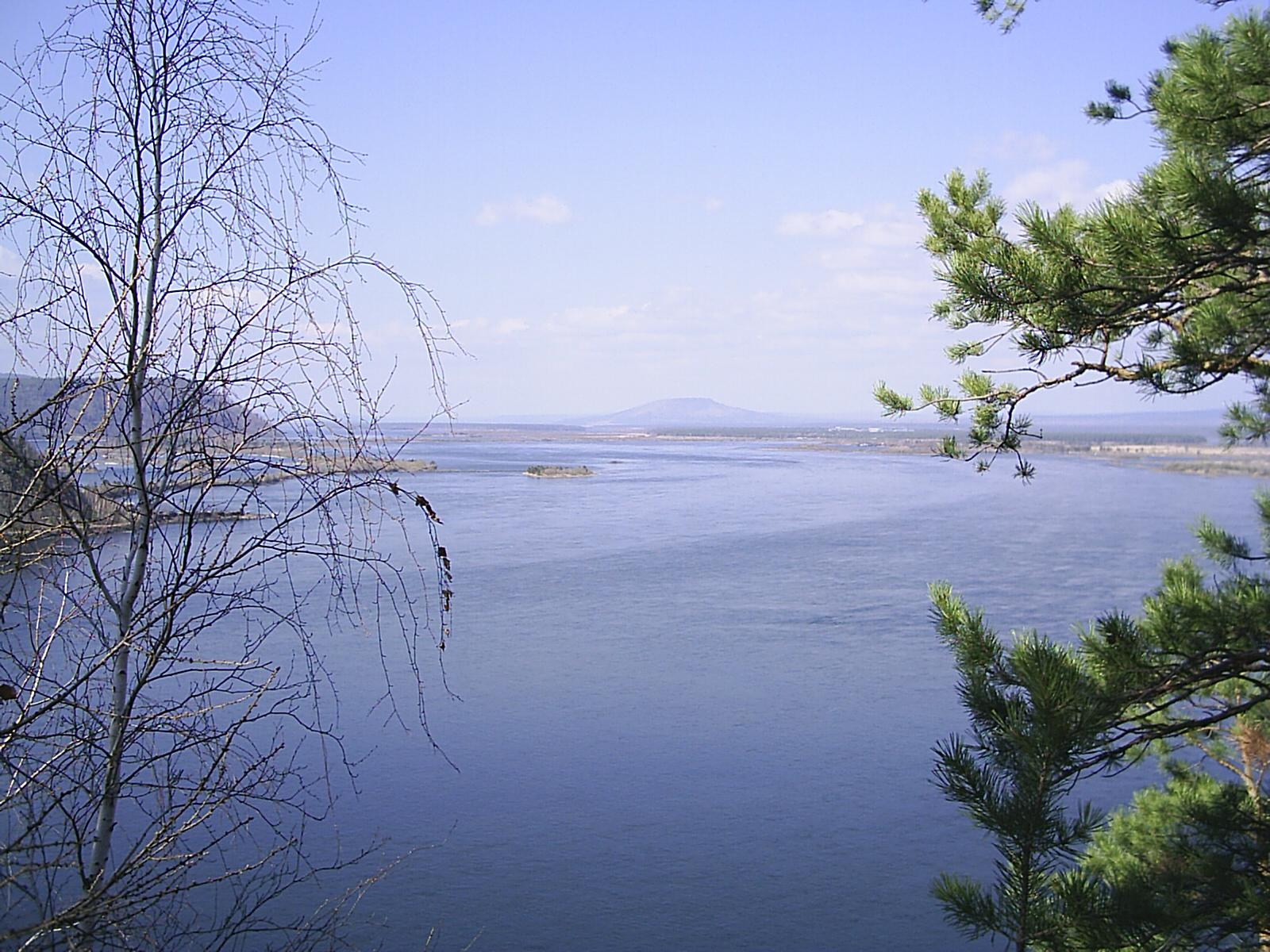 г. Братск, Иркутская область, Россия. Снимки мая 2005 г.